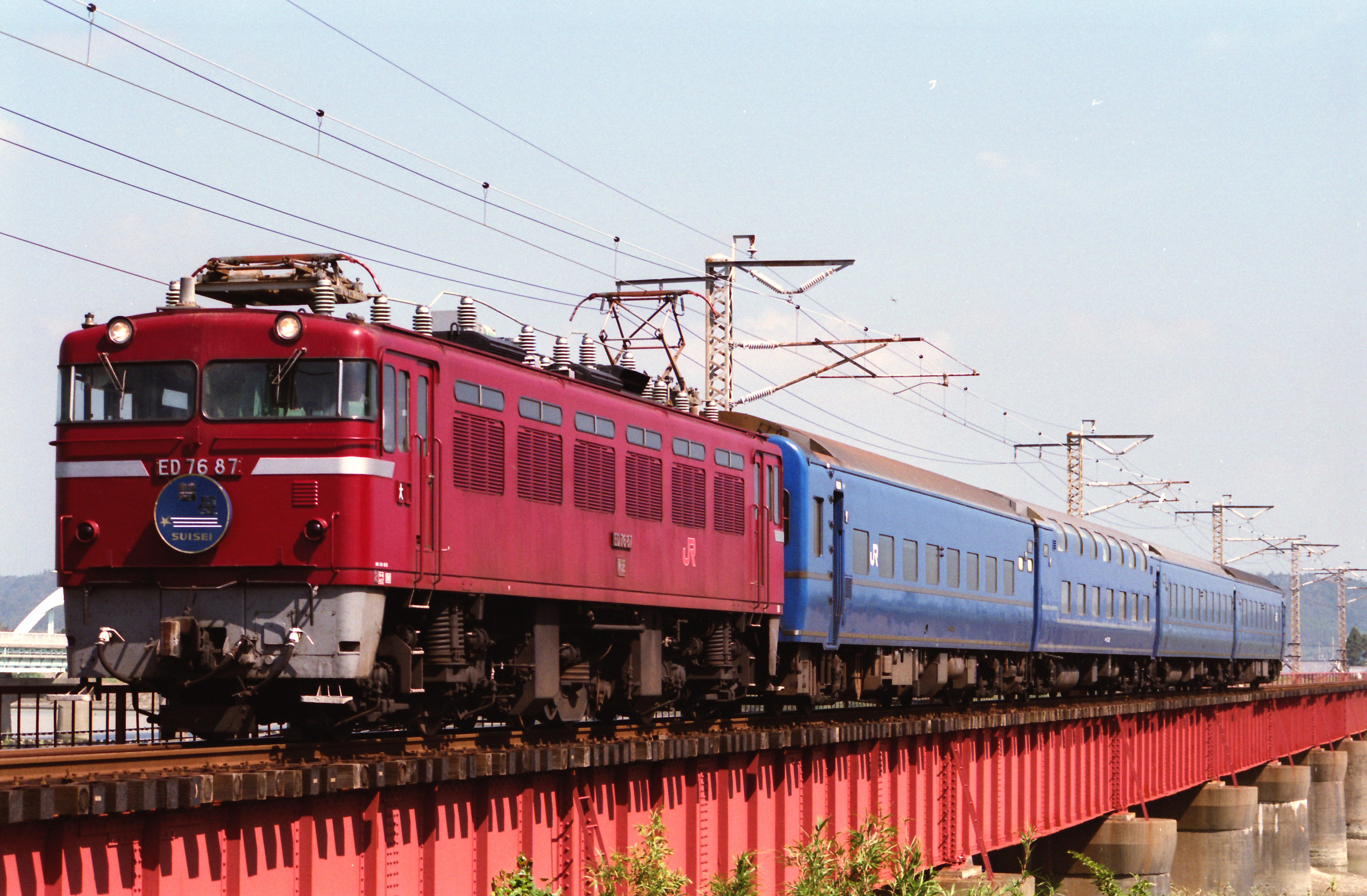 “時間は午前10時過ぎ、終着宮崎を目指して日豊本線・日向新富―佐土原間、一ツ瀬川橋梁を駆け抜ける在りし日のブルートレイン「彗星」。”〔 以下、詳しい説明文は 元サイトで読めます〕